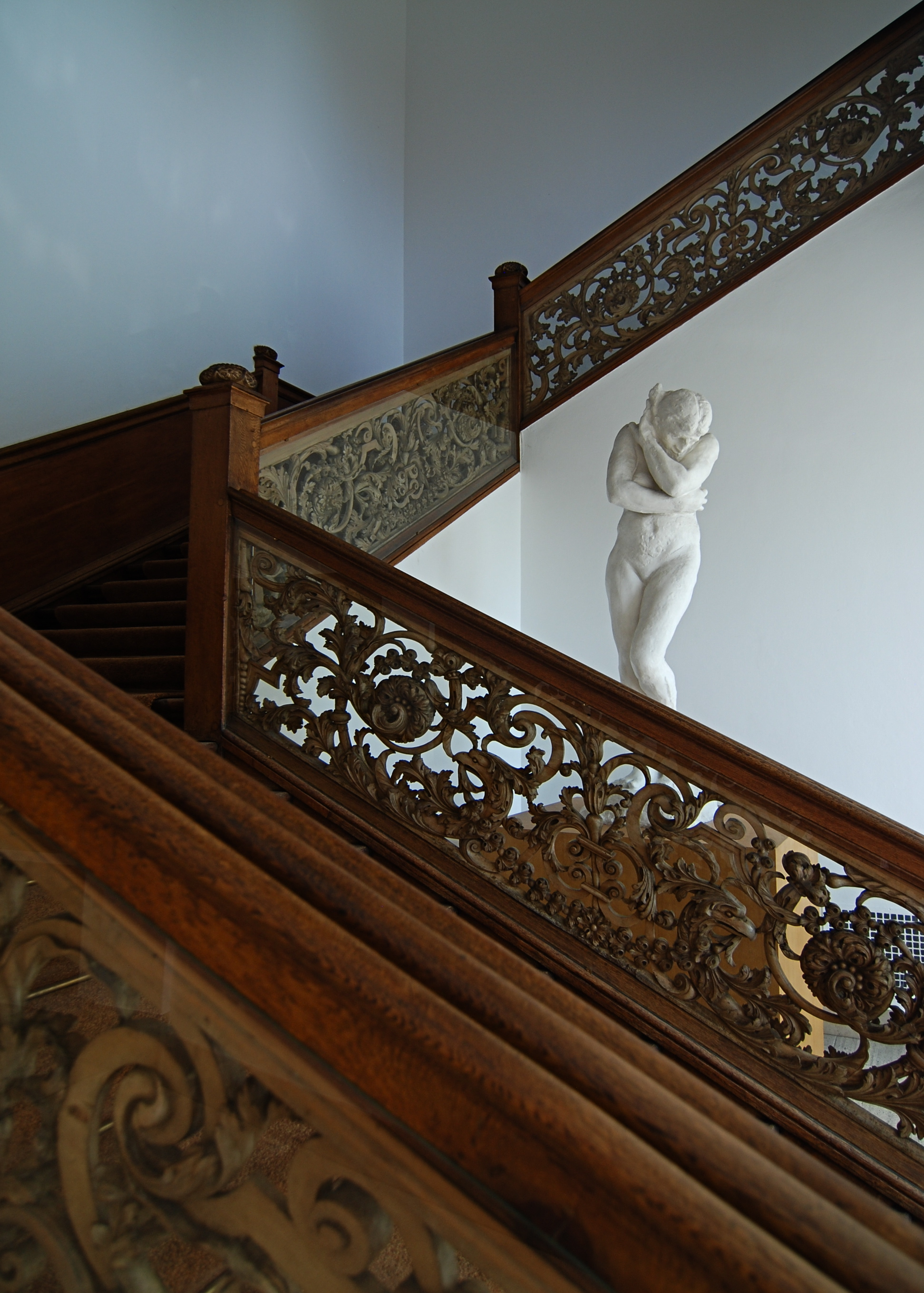 Houten trap, (17de eeuw, trapportaal) 17th century wooden stairs